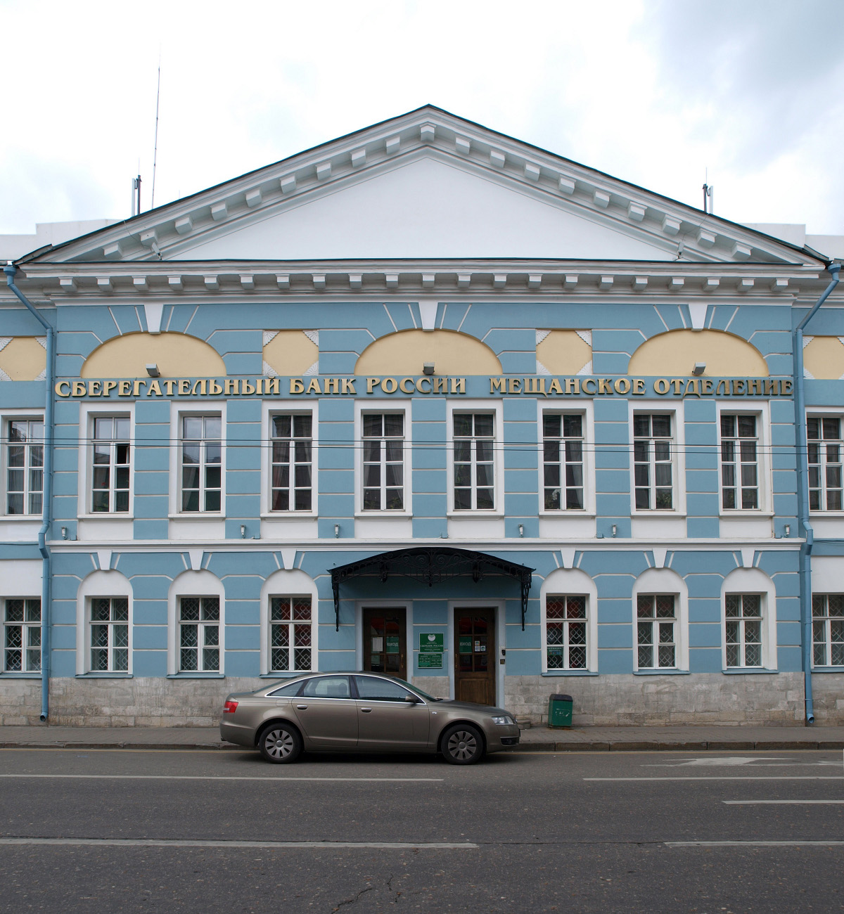 Улица Сретенка, Москва.